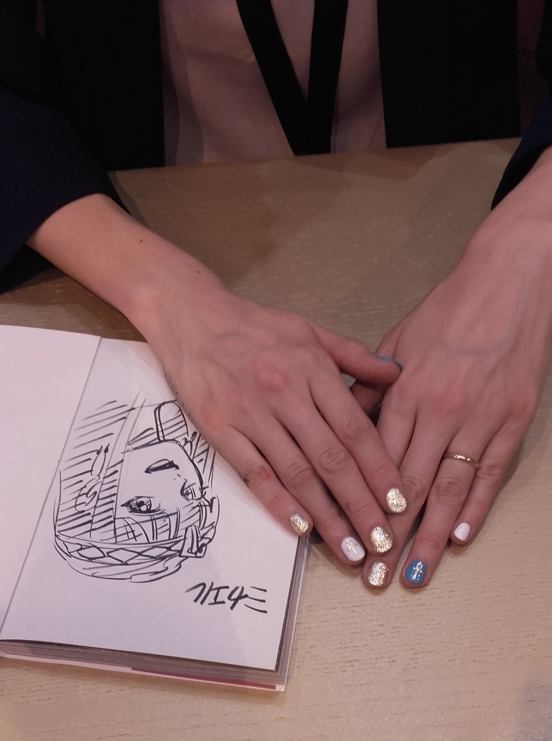 Chie Inudoh dédicaçant Reine d'égypte (Ao i horusu no hitomi - dansō no joō no monogatari) au salon du livre de Paris le 24 mars 2017